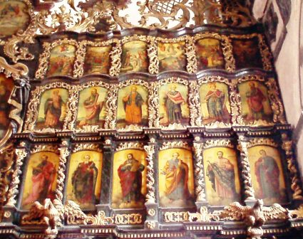 Фотографија иконостаса Николајевске цркве у Земуну аутора Димитрија Бачевића из 1762. године (детаљ 3.), аутор фотографије: Nicolo